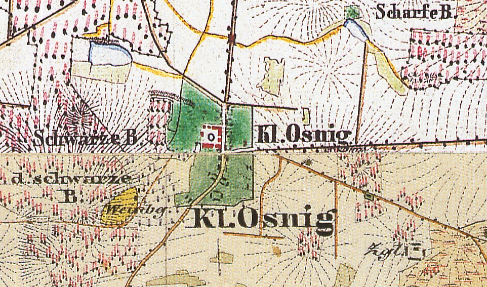 Klein Oßnig, Gemeindeteil von Schorbus, Ortsteil der Stadt Drebkau, Lkr. Spree-Neiße, Brandenburg, Ausschnitte aus den Urmeßtischblätter 4251 Cottbus West (1846) und 4351 Drebkau (1846), kombiniert